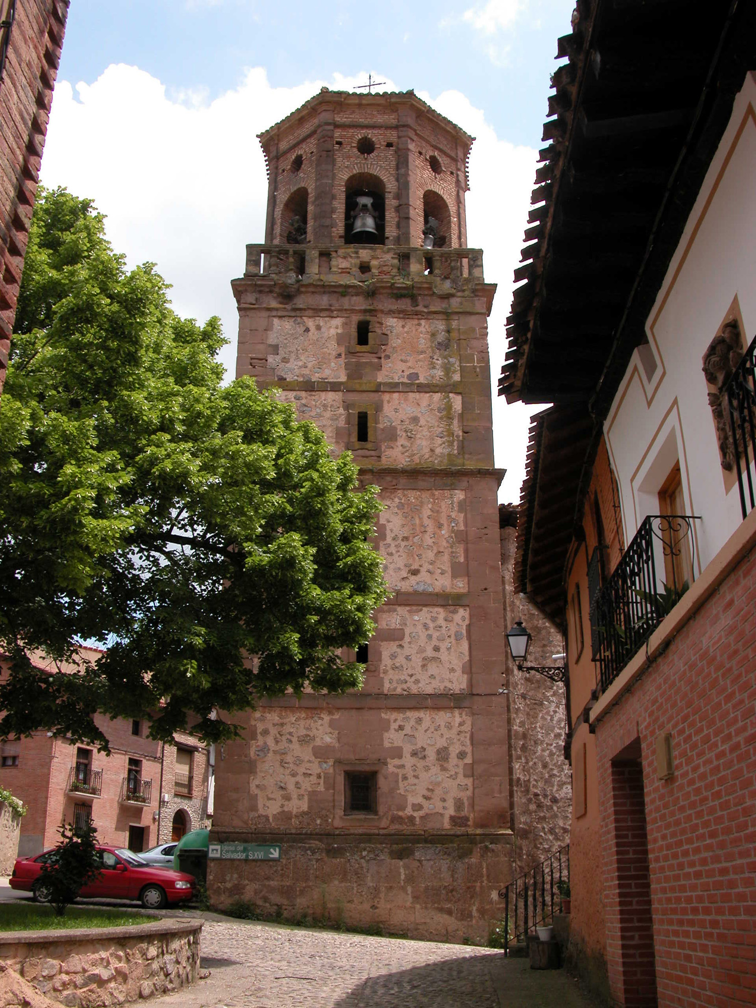 Iglesia de El Salvador en Pedroso (La Rioja - España)